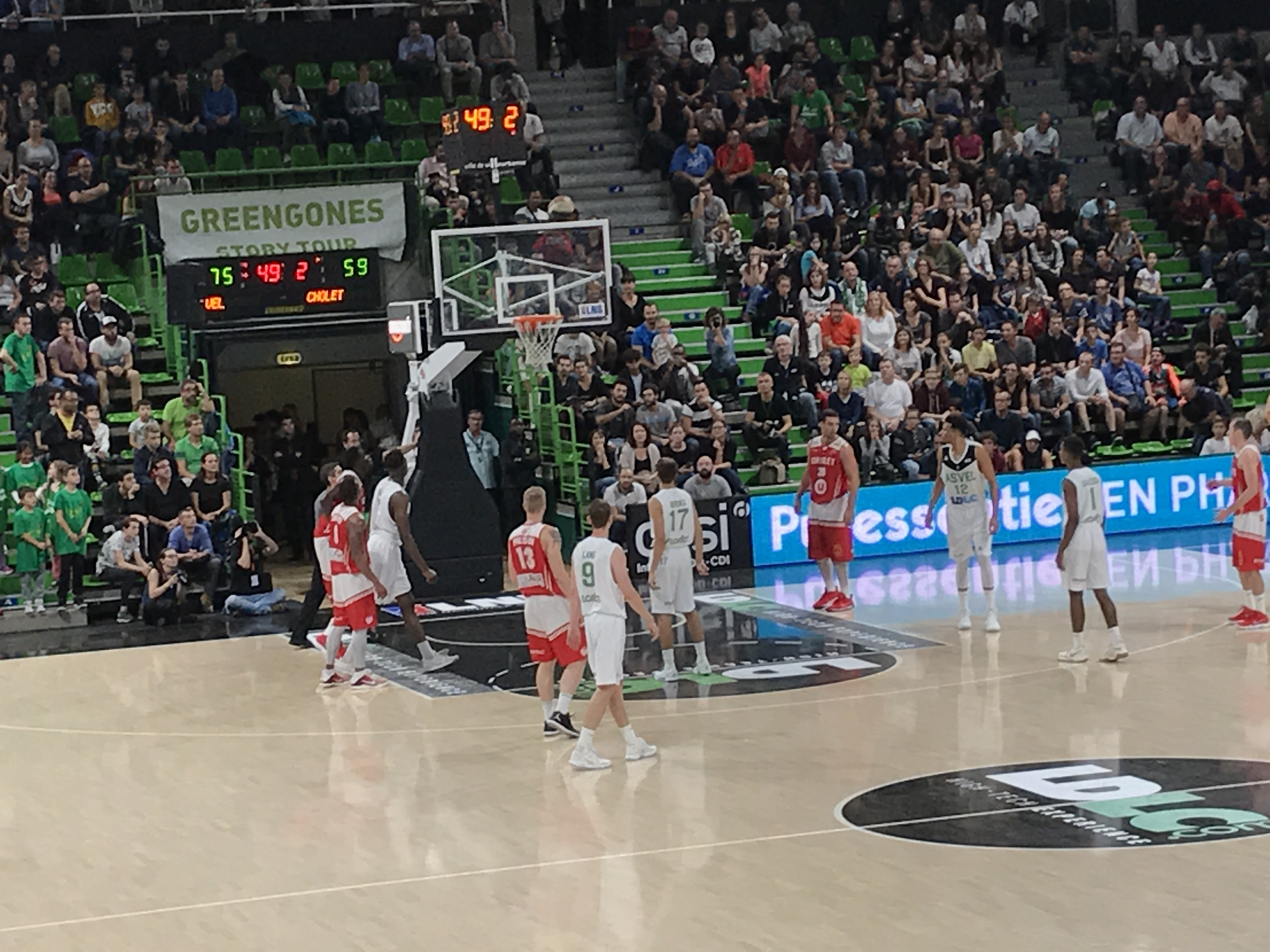 Asvel-Cholet en Pro A de basket-ball à l'Astroballe en septembre 2017.